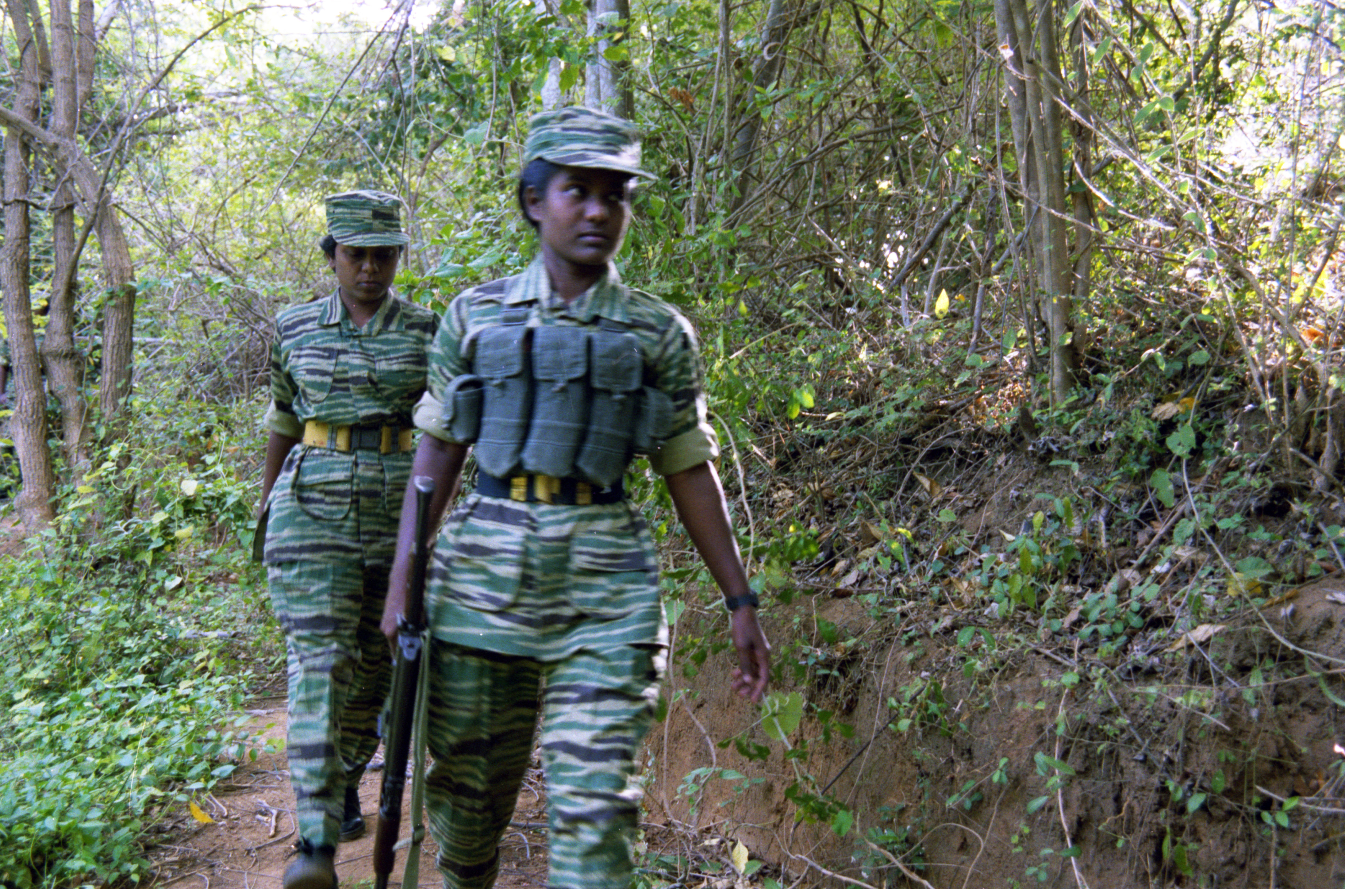 Women of the LTTE 1, northern Sri Lanka, 2002